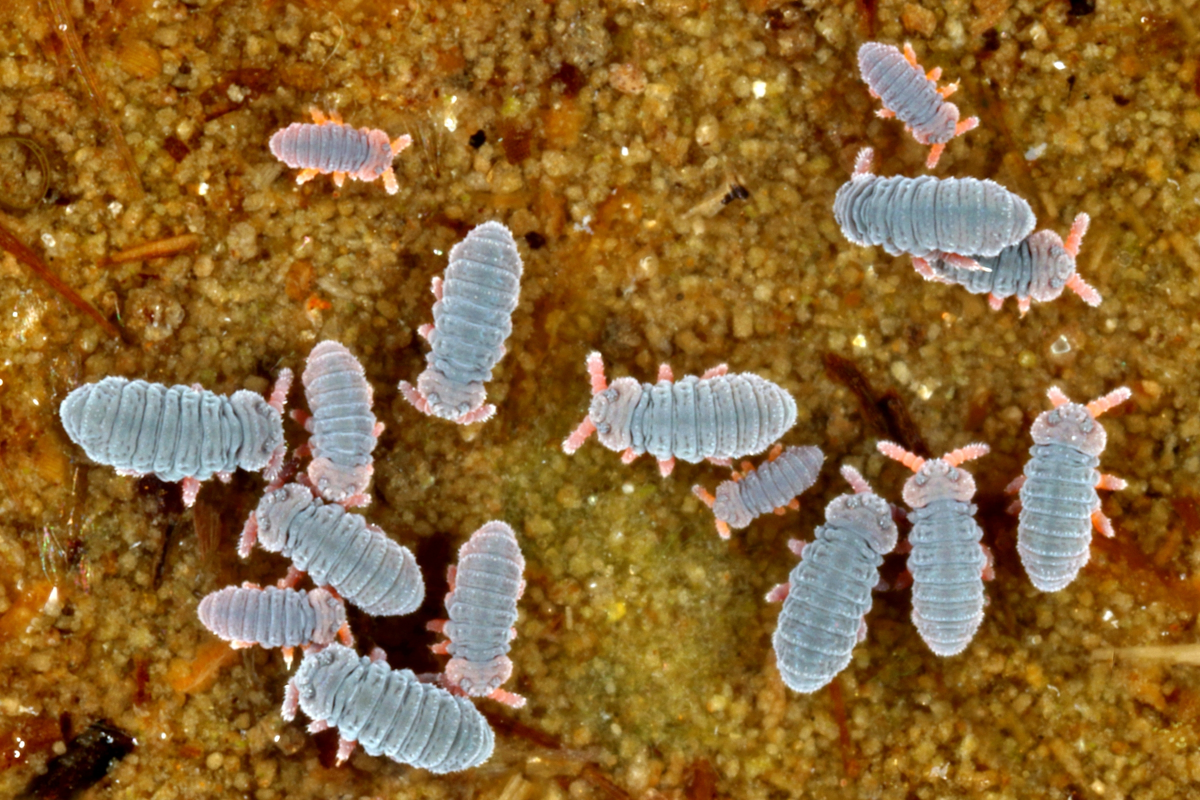 Trouvés dans une zone humide (Alt. 1630 m - Pyrénées ariégeoises)